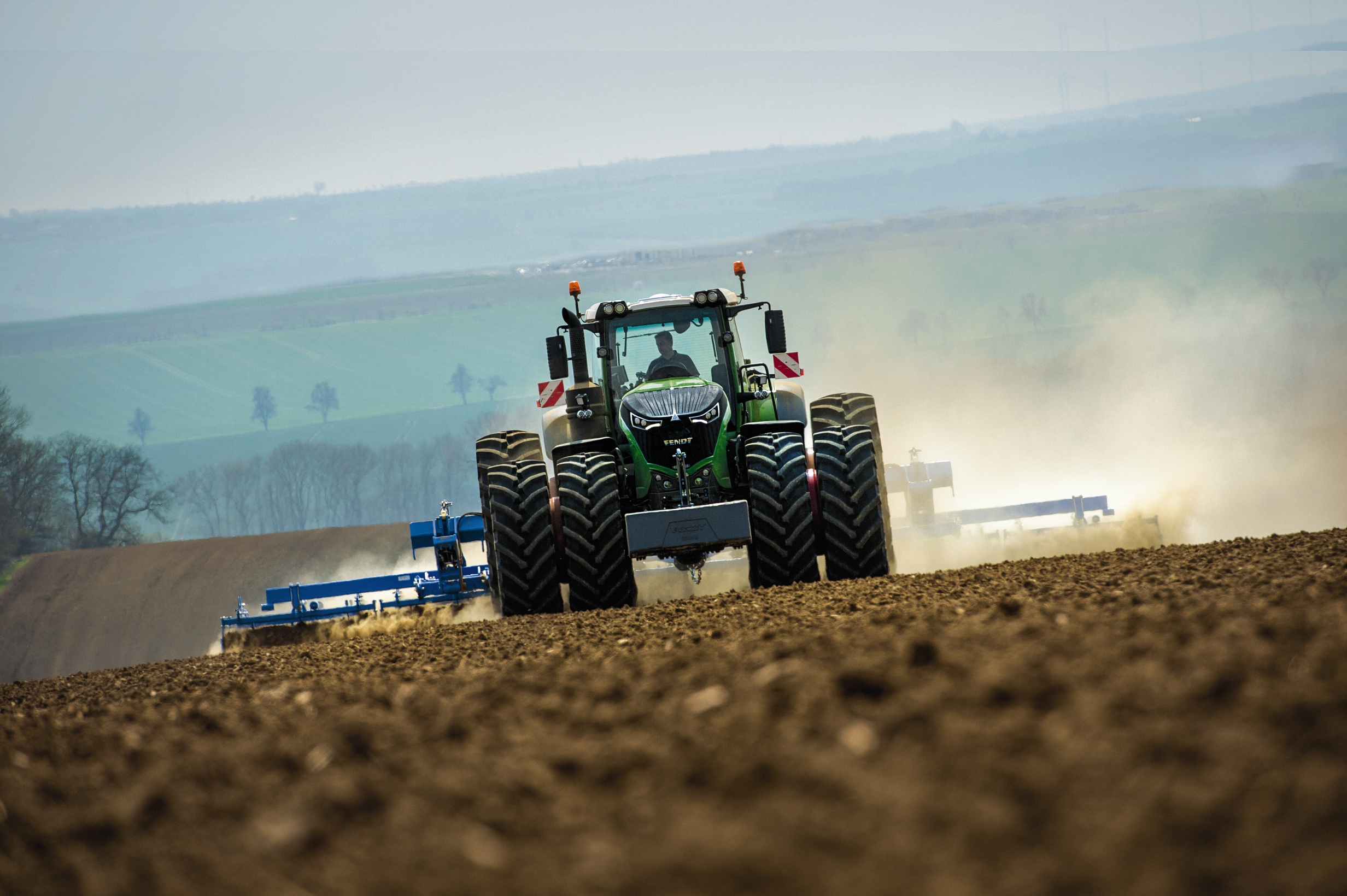 Fendt 1000 Vario mit einer Saatbettkombination von Lemken